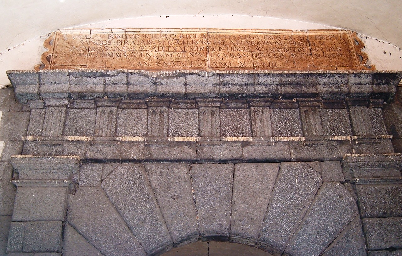 Particolare dell'iscrizione sulla porta di Carlo V a Catania (1553)